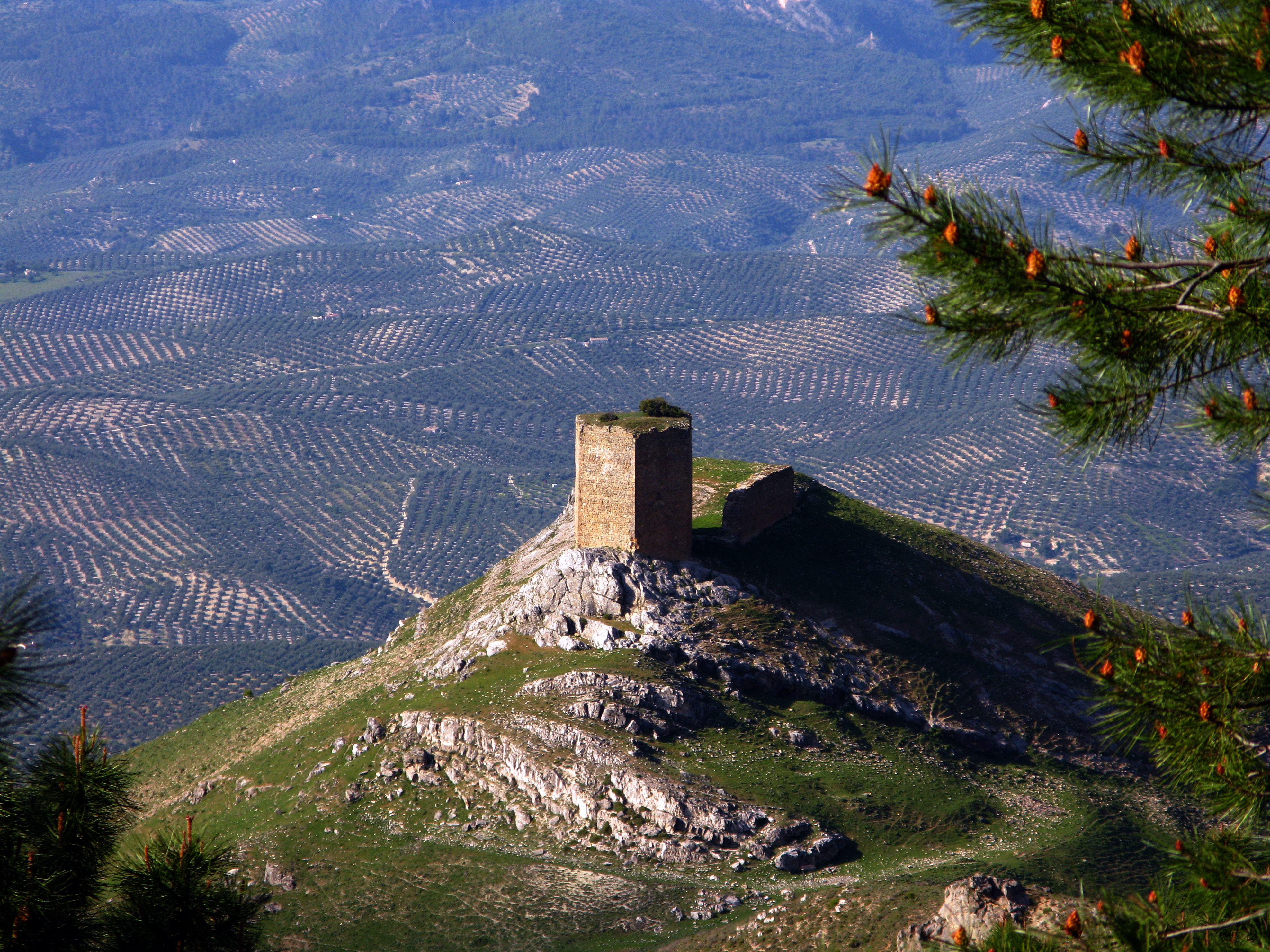 Paque Natural Sierra de Cazorla: Castillo de las Cinco Esquinas This is a photography of a Special Area of Conservation in Spain with the ID: ES0000035. Natura2000 entry, EEA entry